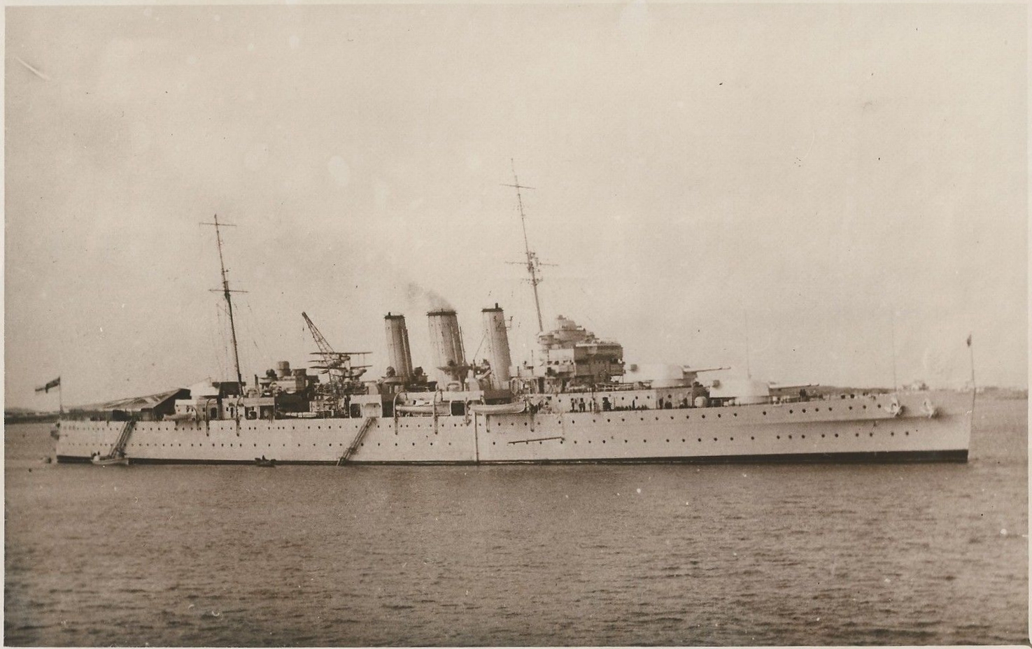 多塞特郡号巡洋舰在青岛